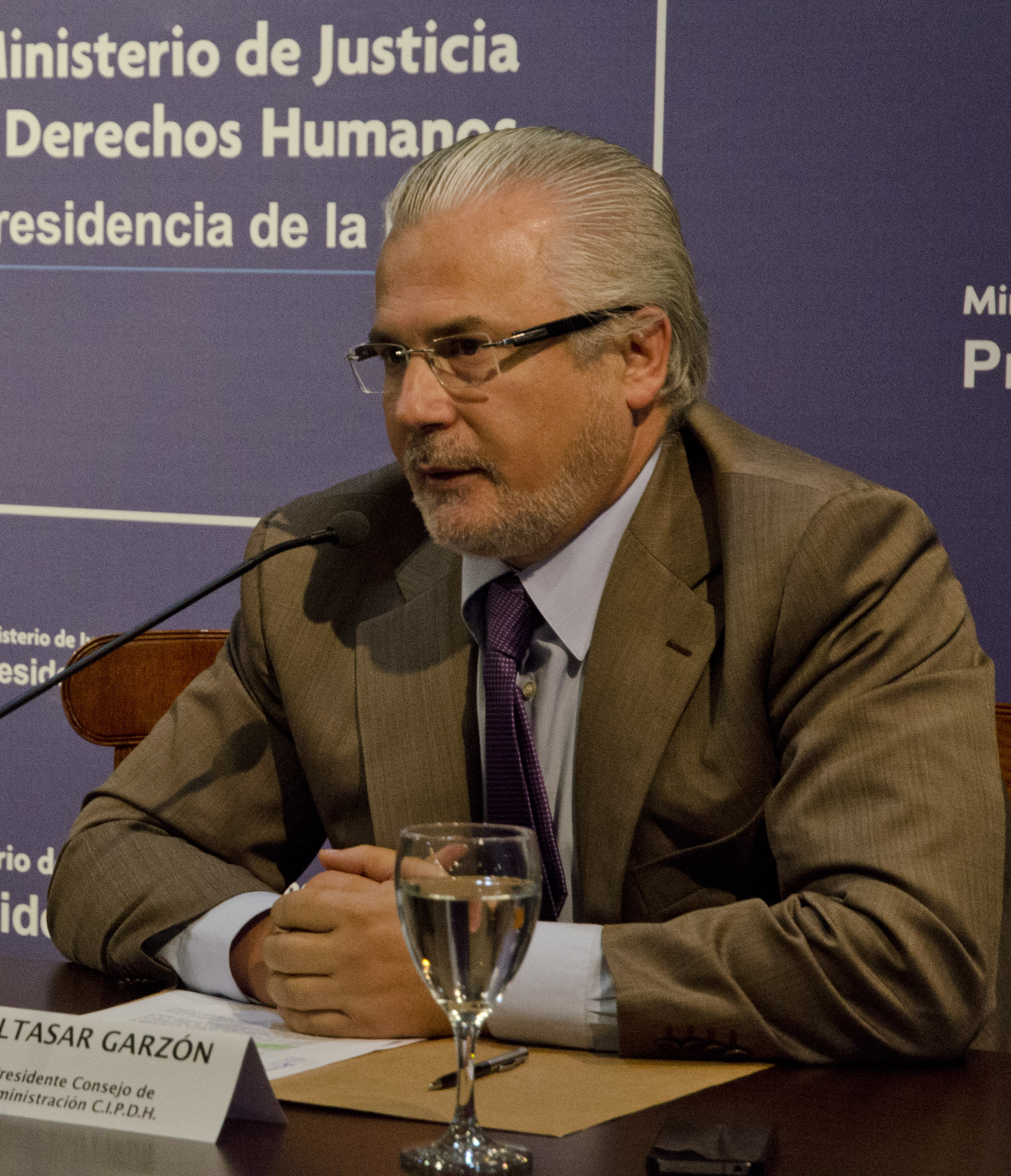 Buenos Aires, 3 de septiembre de 2014.- La ministra Parodi inauguró el seminario "Argentina- África: aportes para la construcción de una agenda de trabajo compartida en Derechos Humanos", Organizado por el Centro Internacional para la Promoción de los Derechos Humanos (CIPDH). También participaron del encuentro, Lidia Brito (representante de la Oficina Regional de Ciencias de la UNESCO apra América Latina y el Caribe ante los gobiernos de Argentina, Paraguay y Uruguay), Baltasar Garzón Real (Presidente del Consejo de Administración del CIPDH) y Martín Fresneda (Secretario de Derechos Humanos de la Presidencia de la Nación). Foto: Augusto Starita / Ministerio de Cultura de la Nación.